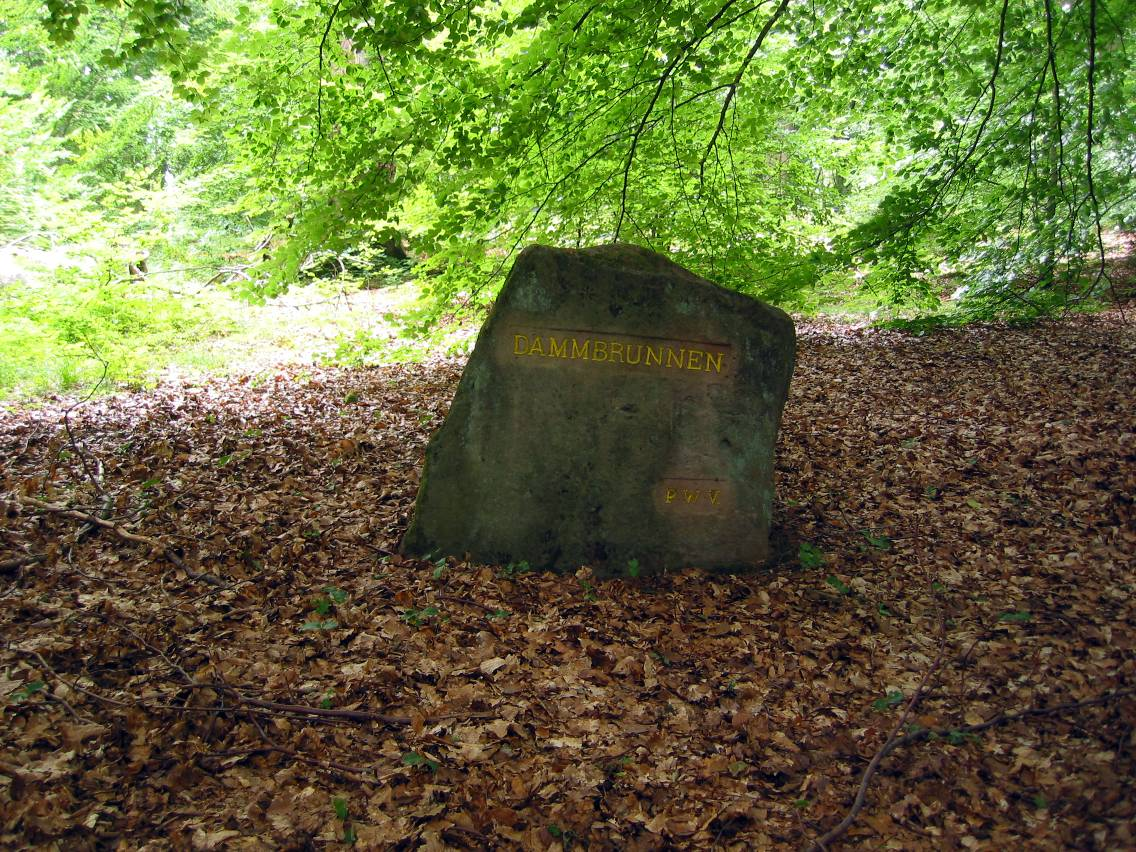 Ritterstein Nummer 146, Dammbrunnen